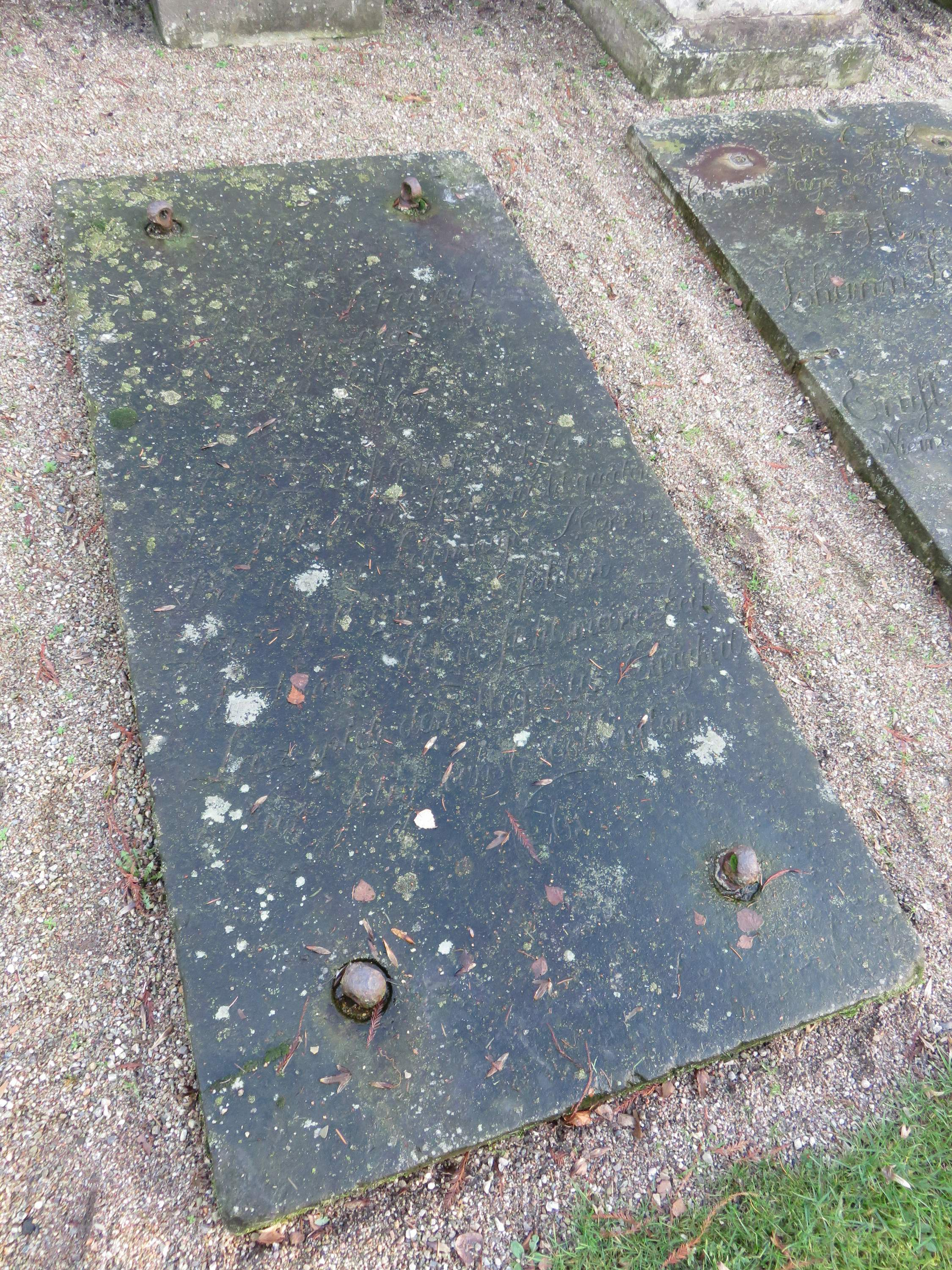 Grabmal für den “Privatgelehrten” Arnold Schuback (1762–1826) im Grabmal-Freilichtmuseum Heckengarten auf dem Hamburger Friedhof Ohlsdorf. Details und Inschrift bei Eberhard Kändler: Begräbnishain und Gruft. Die Grabmale der Oberschicht auf den alten Hamburger Friedhöfen. Christians Verlag, Hamburg 1997, ISBN 3-7672-1294-3, S. 131, Inschrift ebenfalls bei .